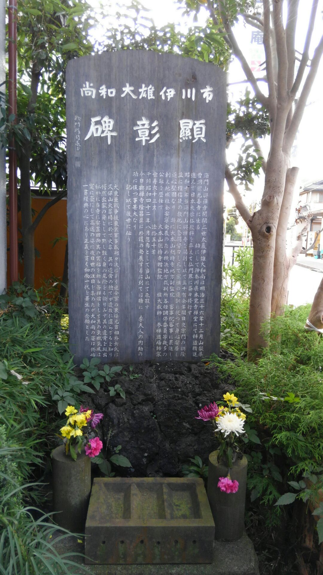 二世市川伊雄大和尚の業績を顕彰する内容